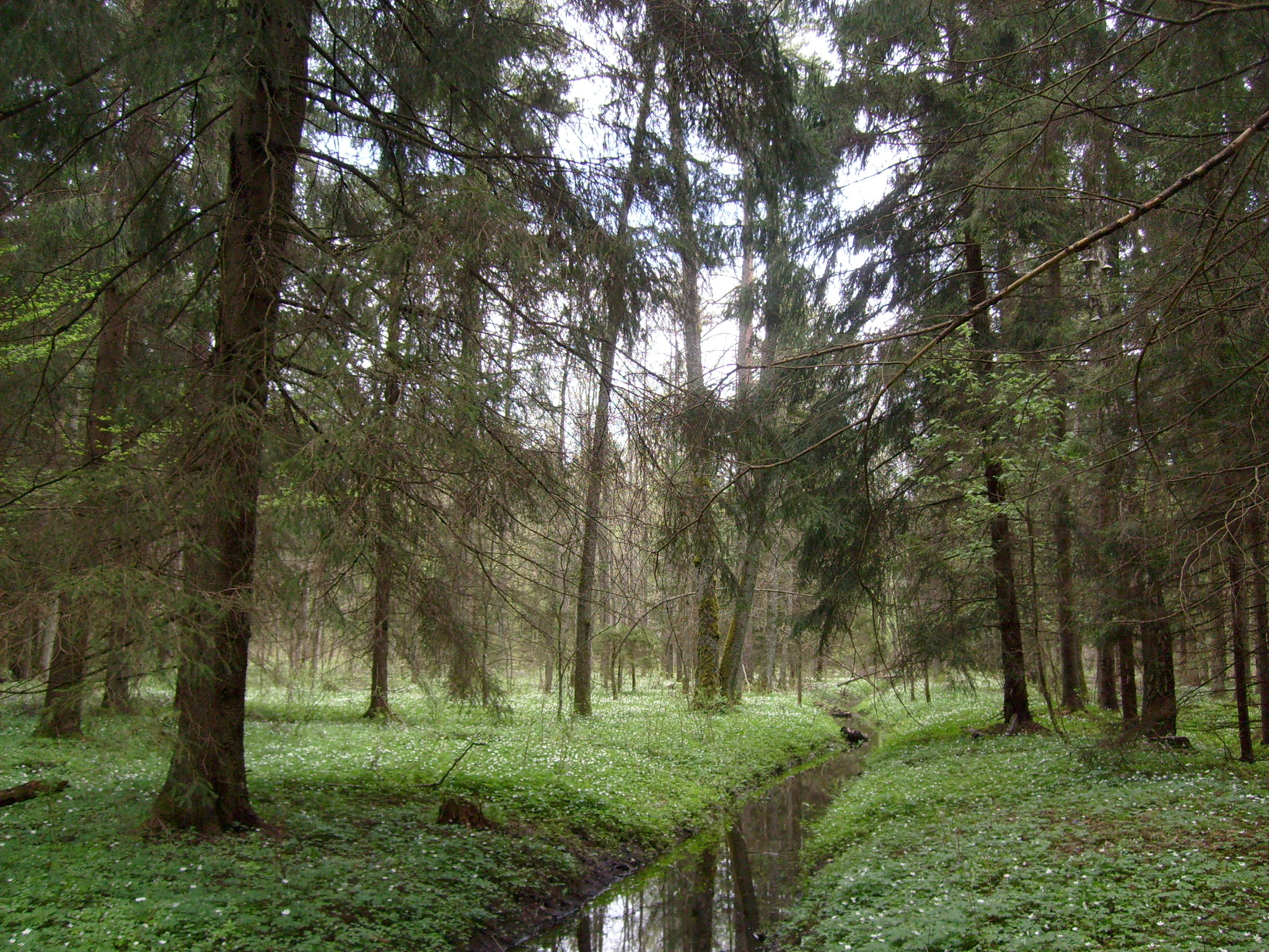 Puszcza Ladzka oddział 55